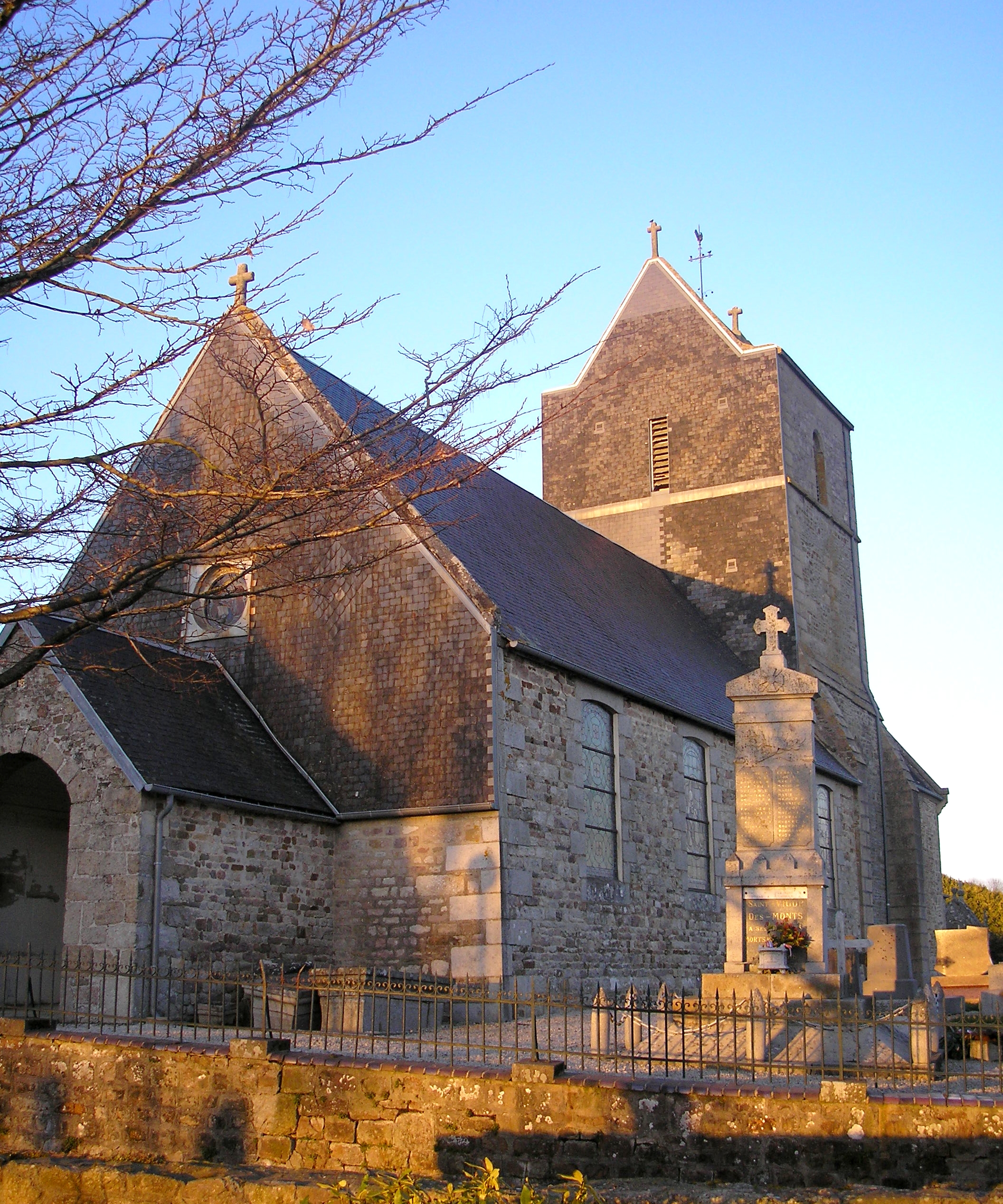 Saint-Vigor-des-Monts (Normandie, France). L'église Saint-Vigor.